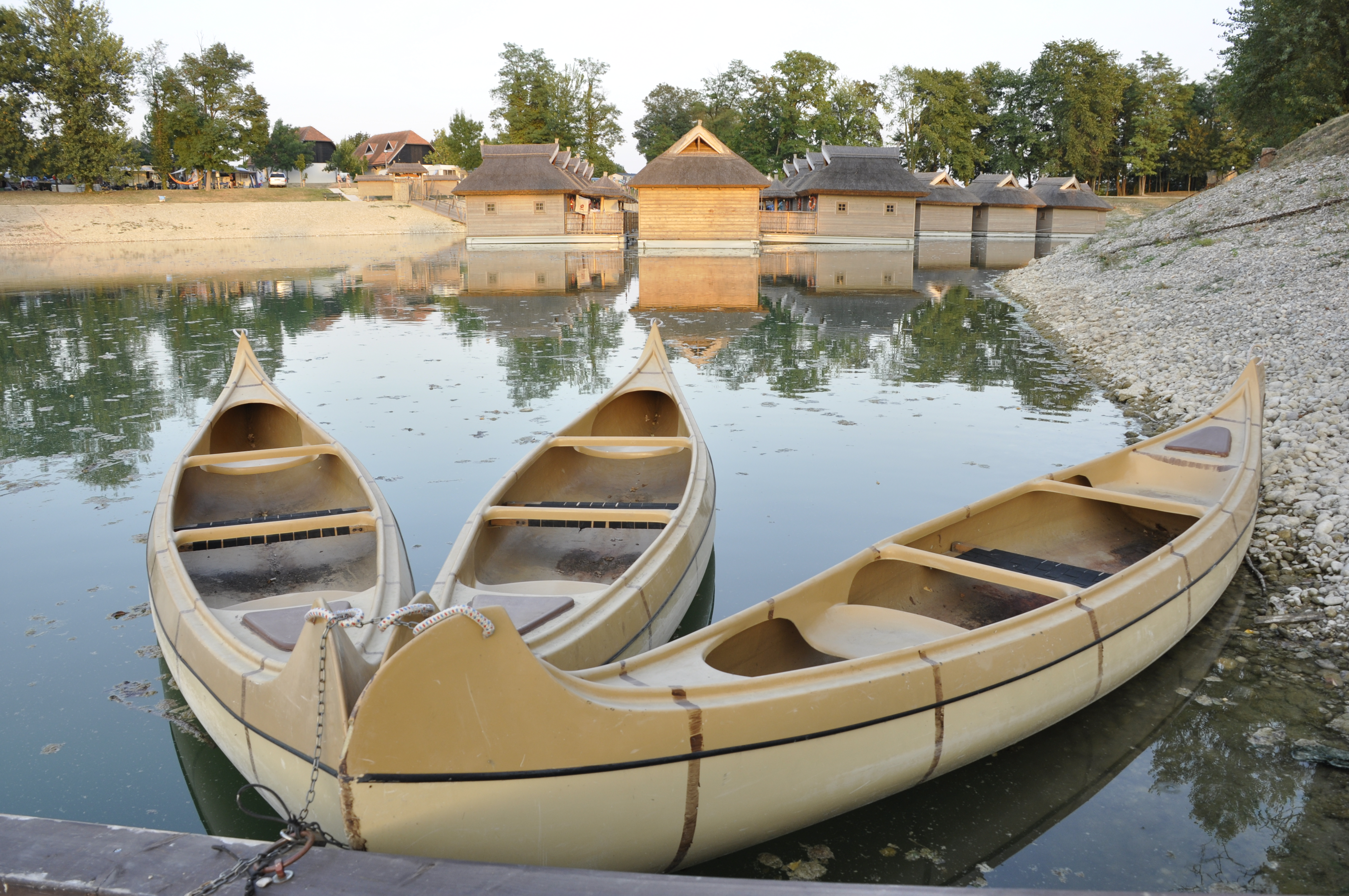 Terme Catez indianendorp